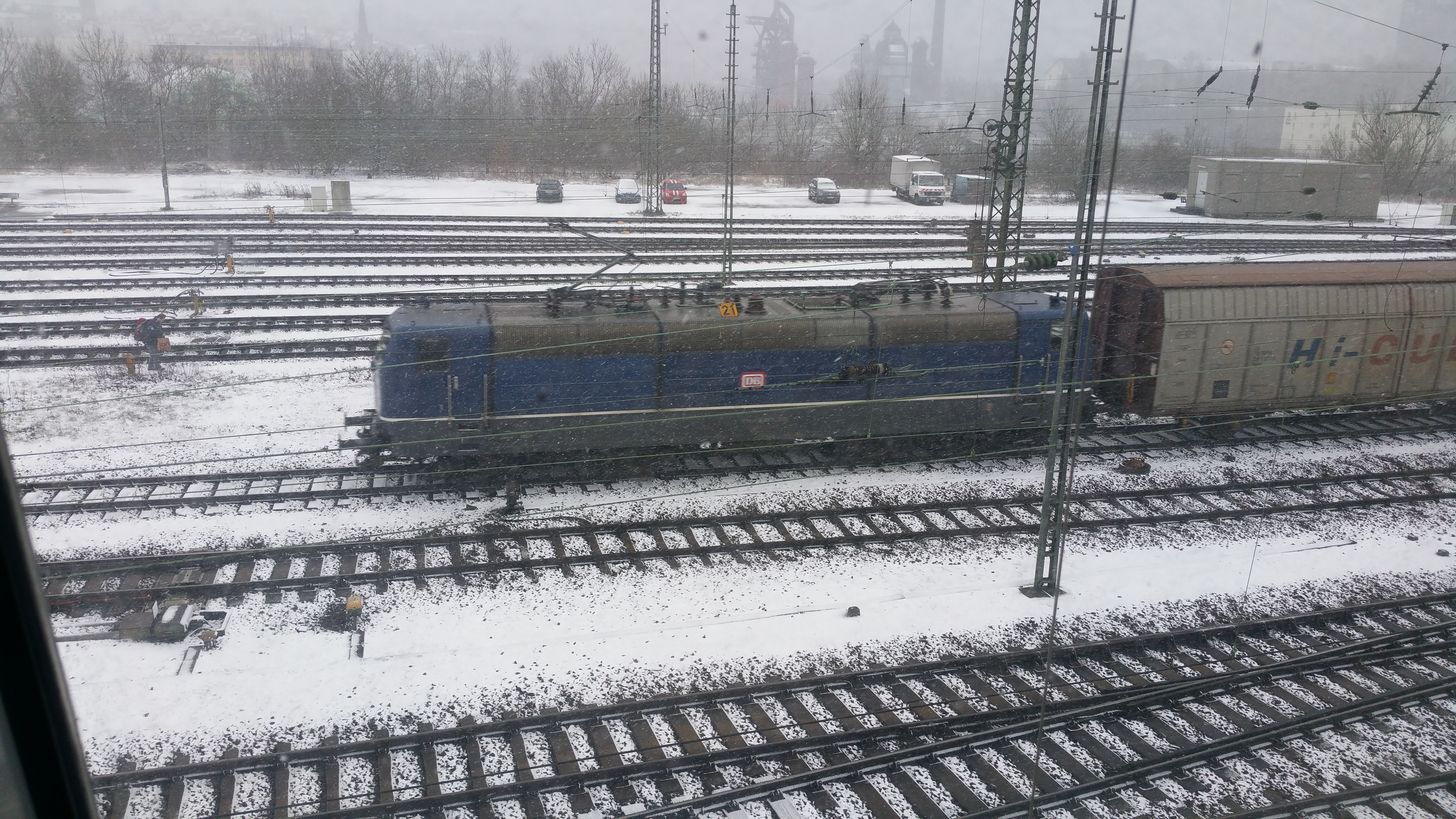 DB Br 181 201-5 vor einem Güterzug in Neunkirchen (Saar) Hbf im Januar 2017.